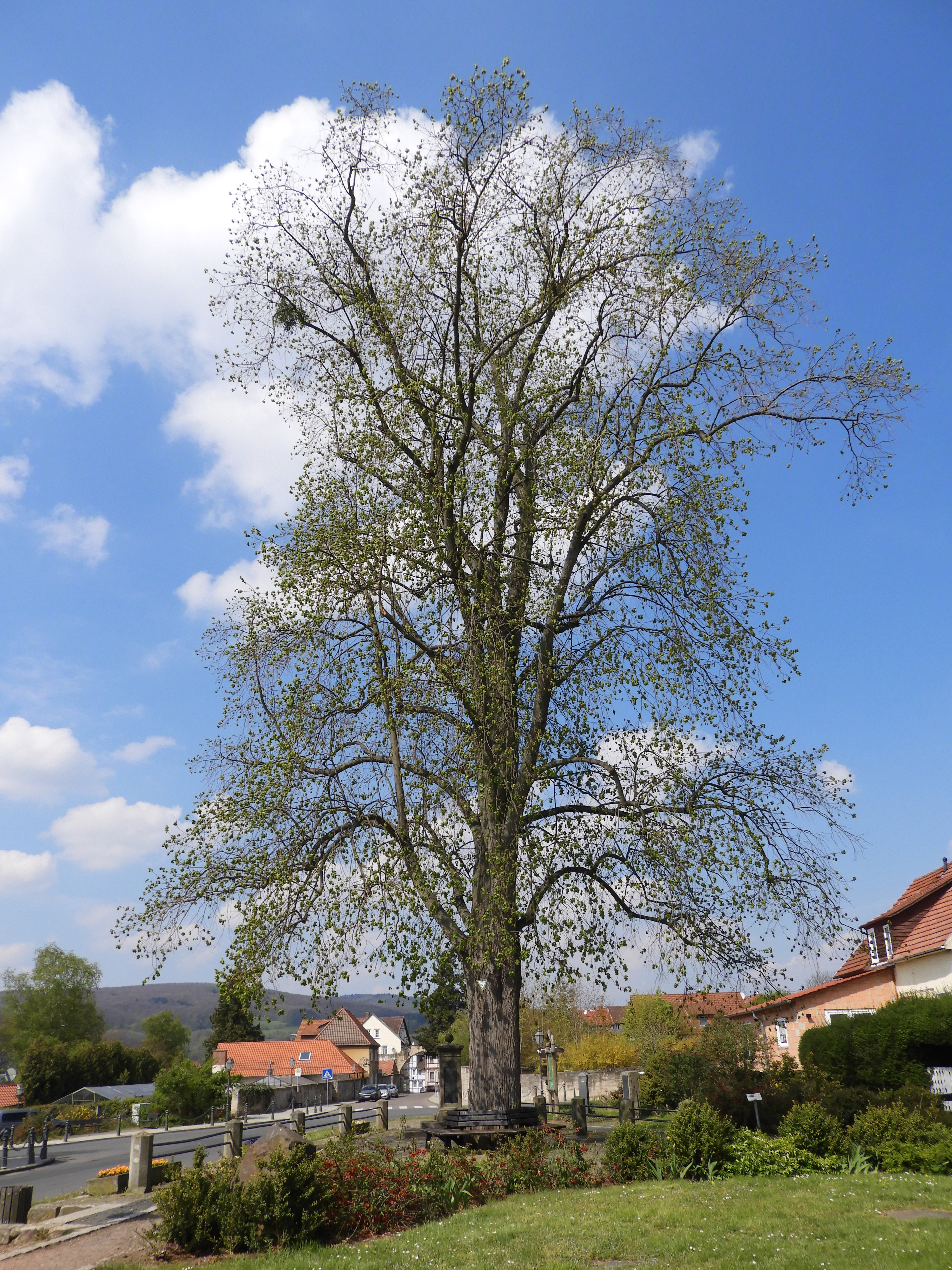 Die Linde im April. Ansicht aus östlicher Richtung. Inspiriert von der „Linde am Brunnen vor dem Tore“ im nordhessischen Bad Sooden-Allendorf soll Wilhelm Müller, so wird überliefert, das Gedicht „Der Lindenbaum“ geschrieben haben. Berühmt wurden die Verse als „Am Brunnen vor dem Tore“ durch die Vertonung von Franz Schubert und durch die Bearbeitung von Friedrich Silcher. Die fast 700 Jahre alt gewordene „Original“-Linde fiel im Mai 1912 einem Sturm zum Opfer. Im Jahr 1914 wurde eine neue Linde an ihrer Stelle gepflanzt, die inzwischen stattliche Ausmaße erreicht hat. Der Baum steht seit 1936 als Naturdenkmal mit der Nummer ND 636.008 unter besonderem Schutz und gehört zu einer als Kulturdenkmal aus geschichtlichen Gründen geschützten Anlage.